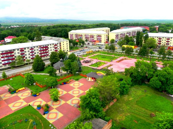 Вид на город Малгобек